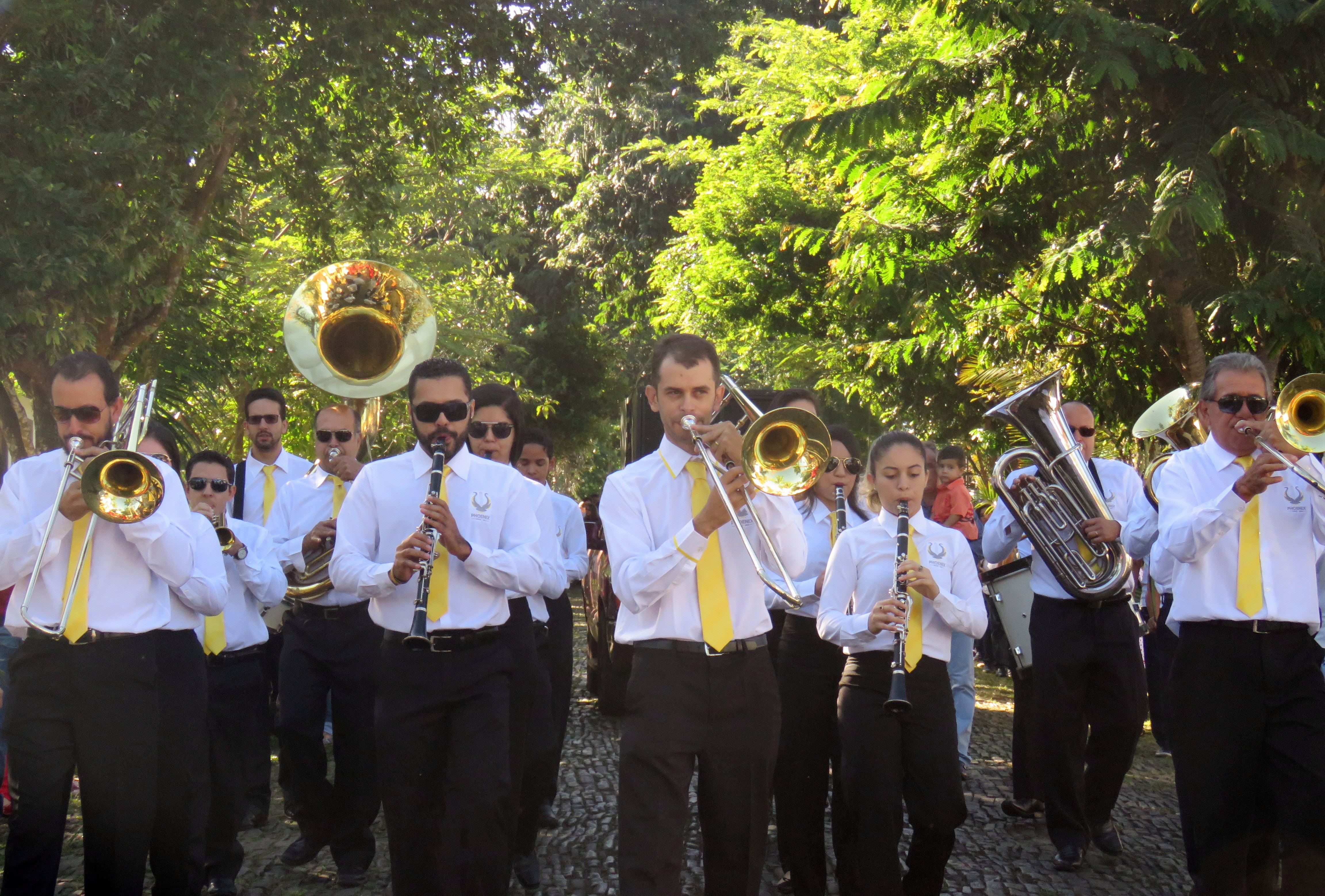 Atuação da Banda Phoenix na Procissão de Ramos na Semana Santa de Pirenópolis